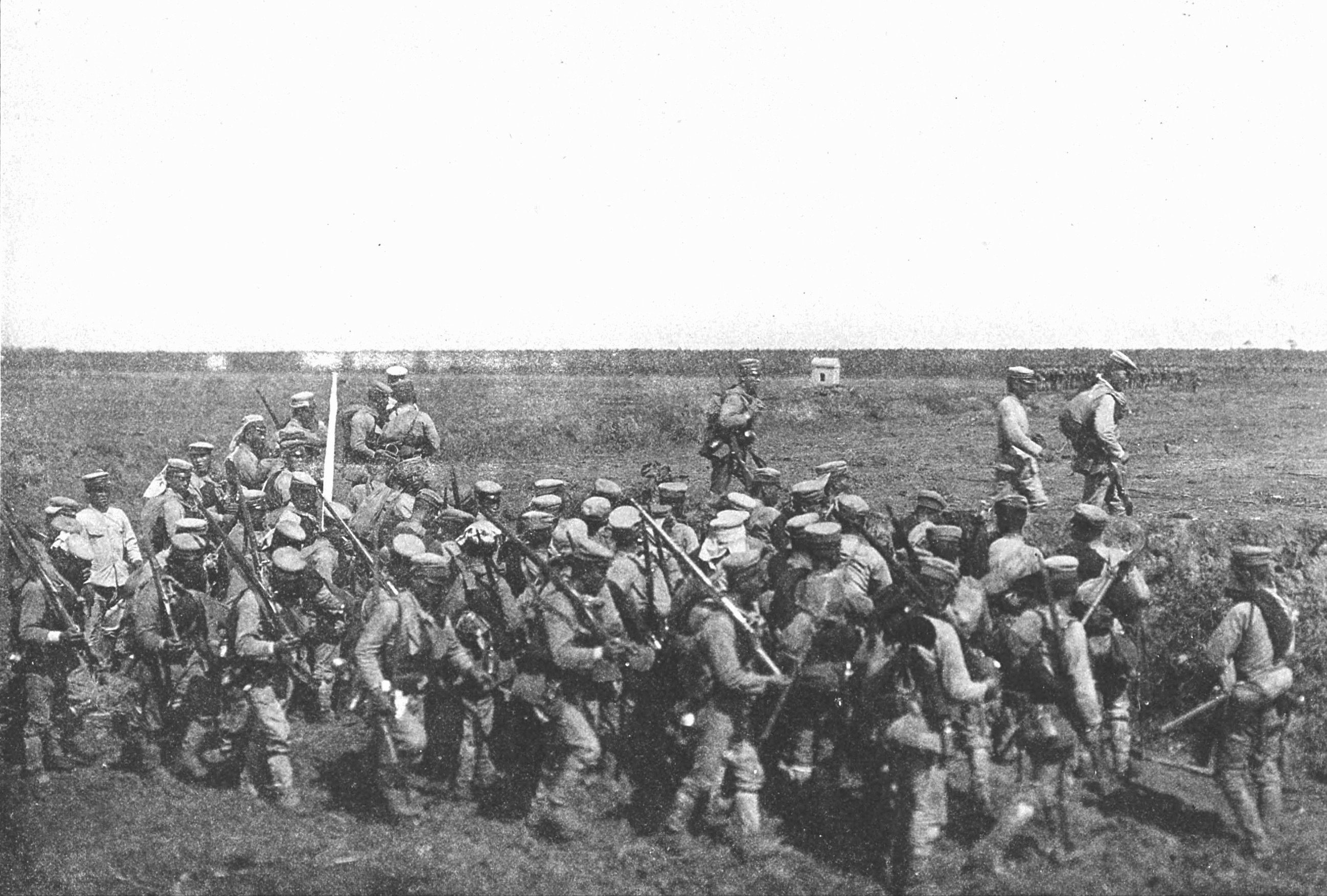 日露戦争における歩兵第13連隊